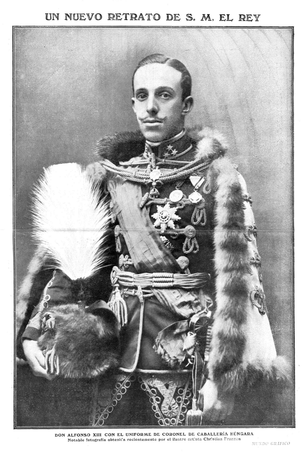 Retrato del rey Alfonso XIII, obra del fotógrafo Christian Franzen, recogido en la revista española Mundo gráfico.